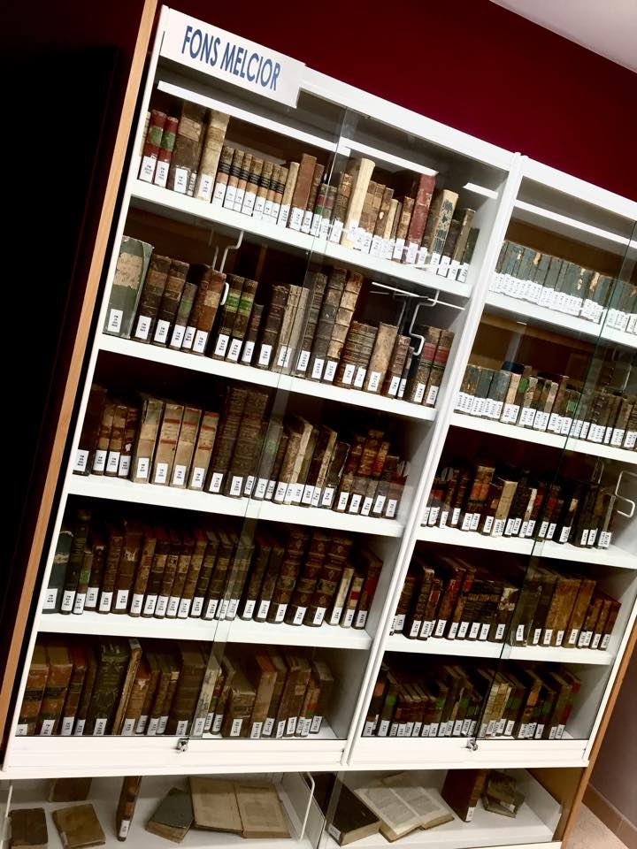 Fons bibliogràfic de Carles-Josep Melcior Fet a la biblioteca Ramon Berenguer IV d'Almenar